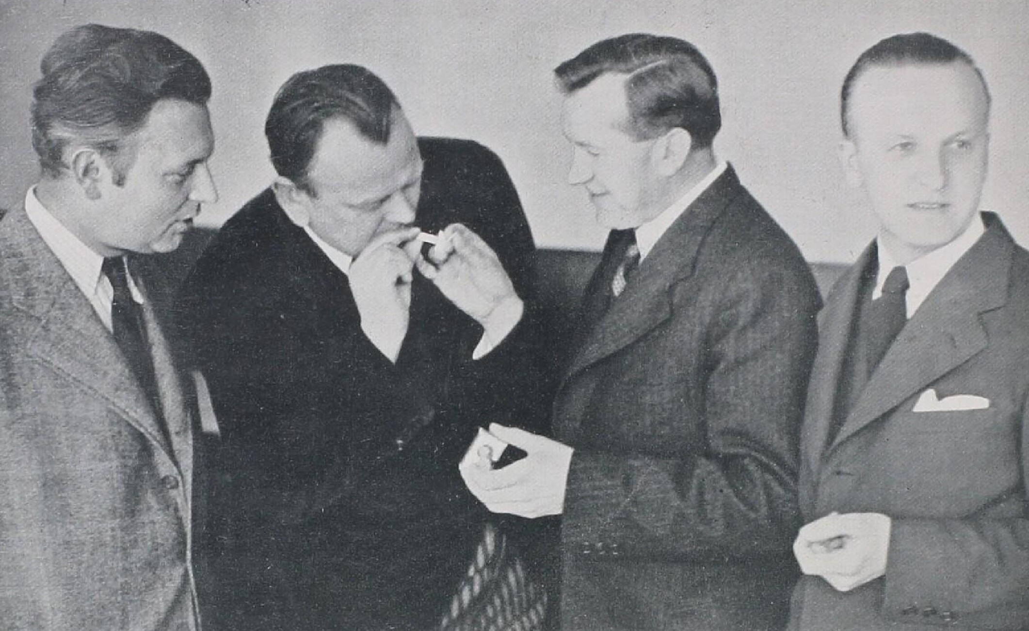 Josef Jedlička (1904-1993), český houslista, profesor hry na housle